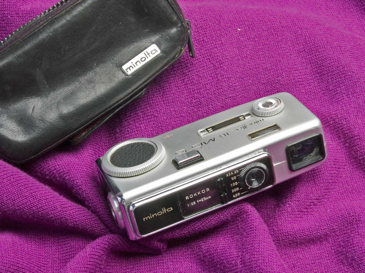 Minikamera Minolta 16 für 16mm Film in Minolta eigener Kassette